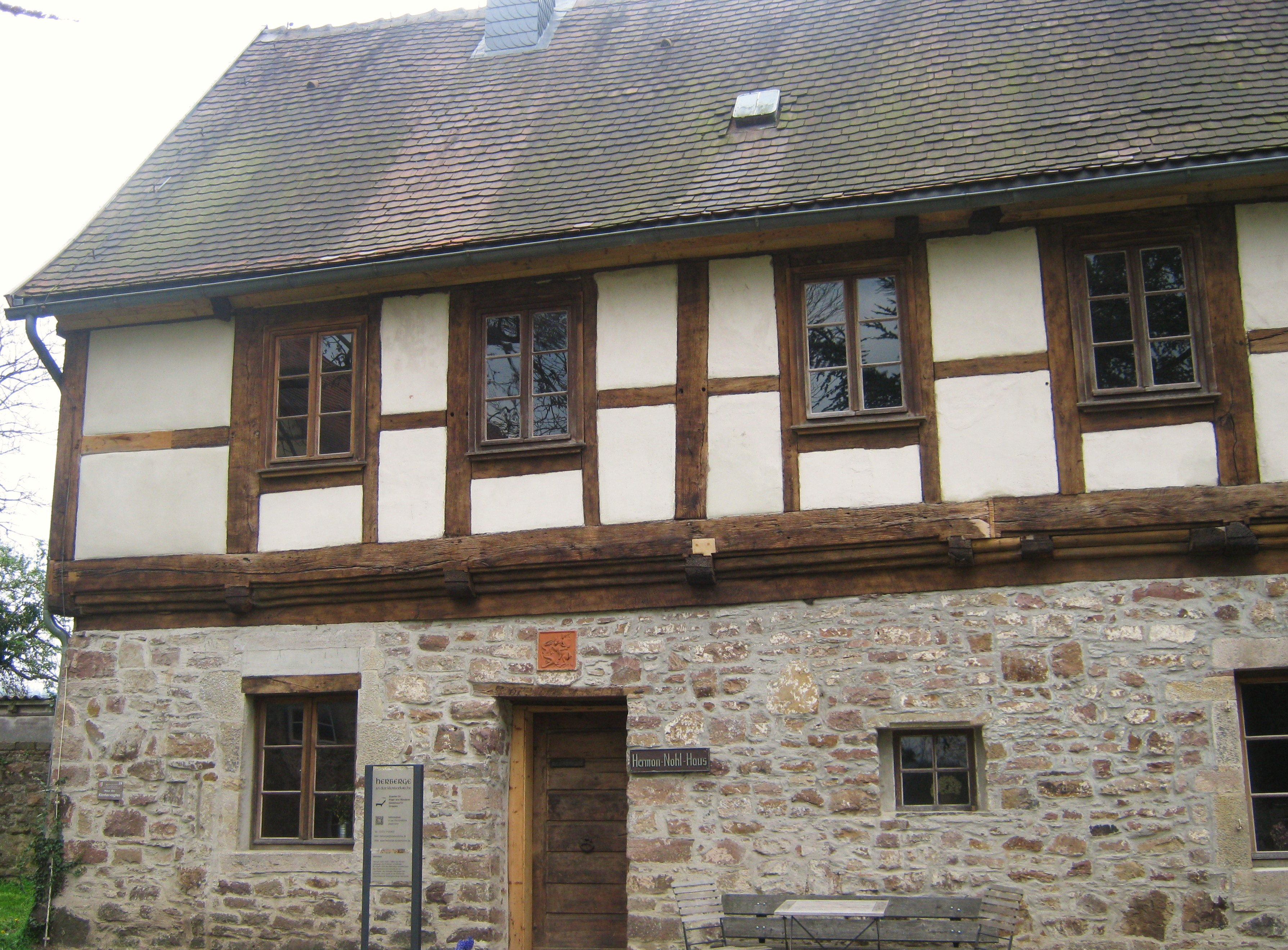 Herman-Nohl-Haus, Herberge des Klosters Lippoldsberg (Nordseite)